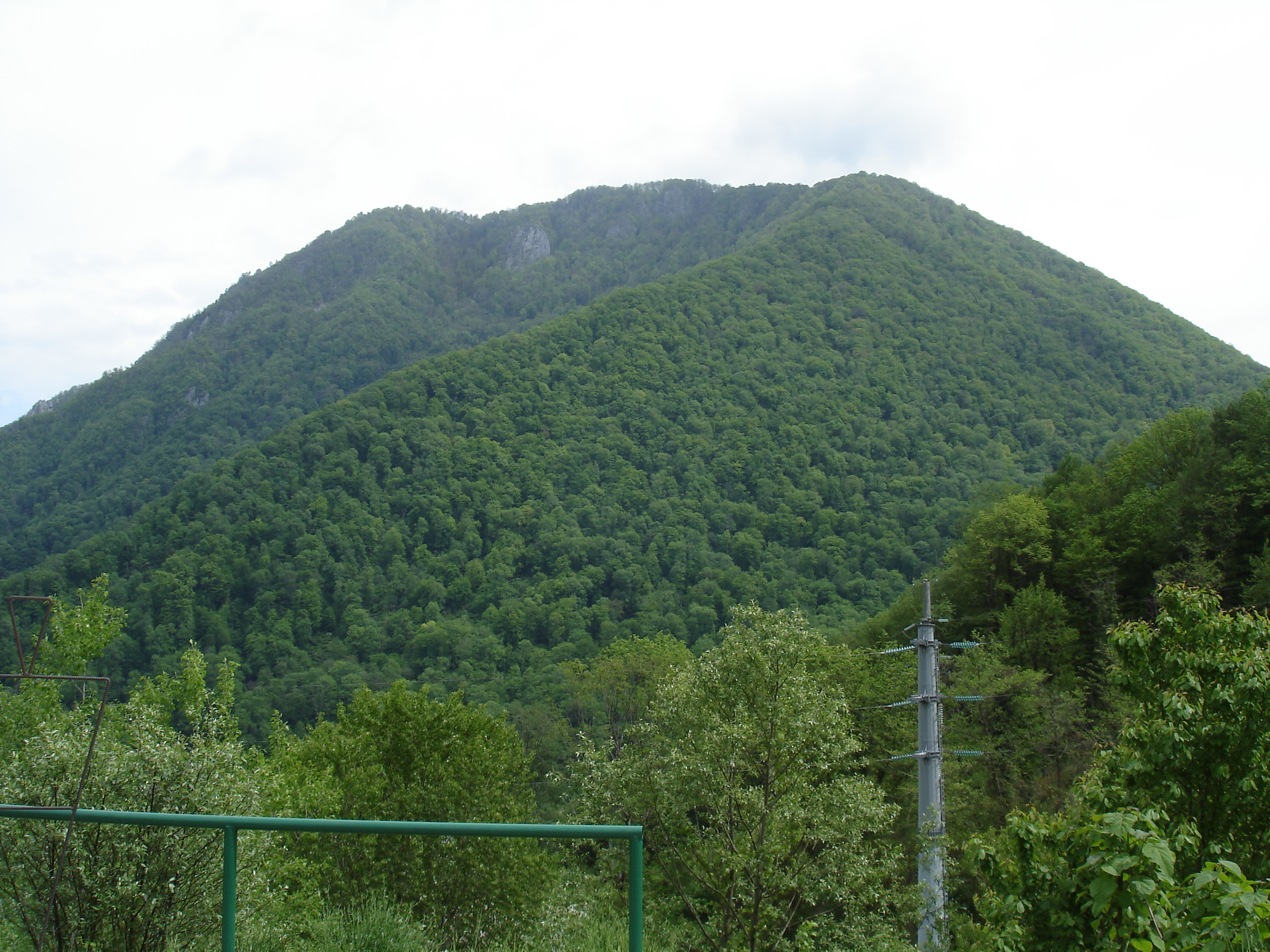 Гора Дзыхра